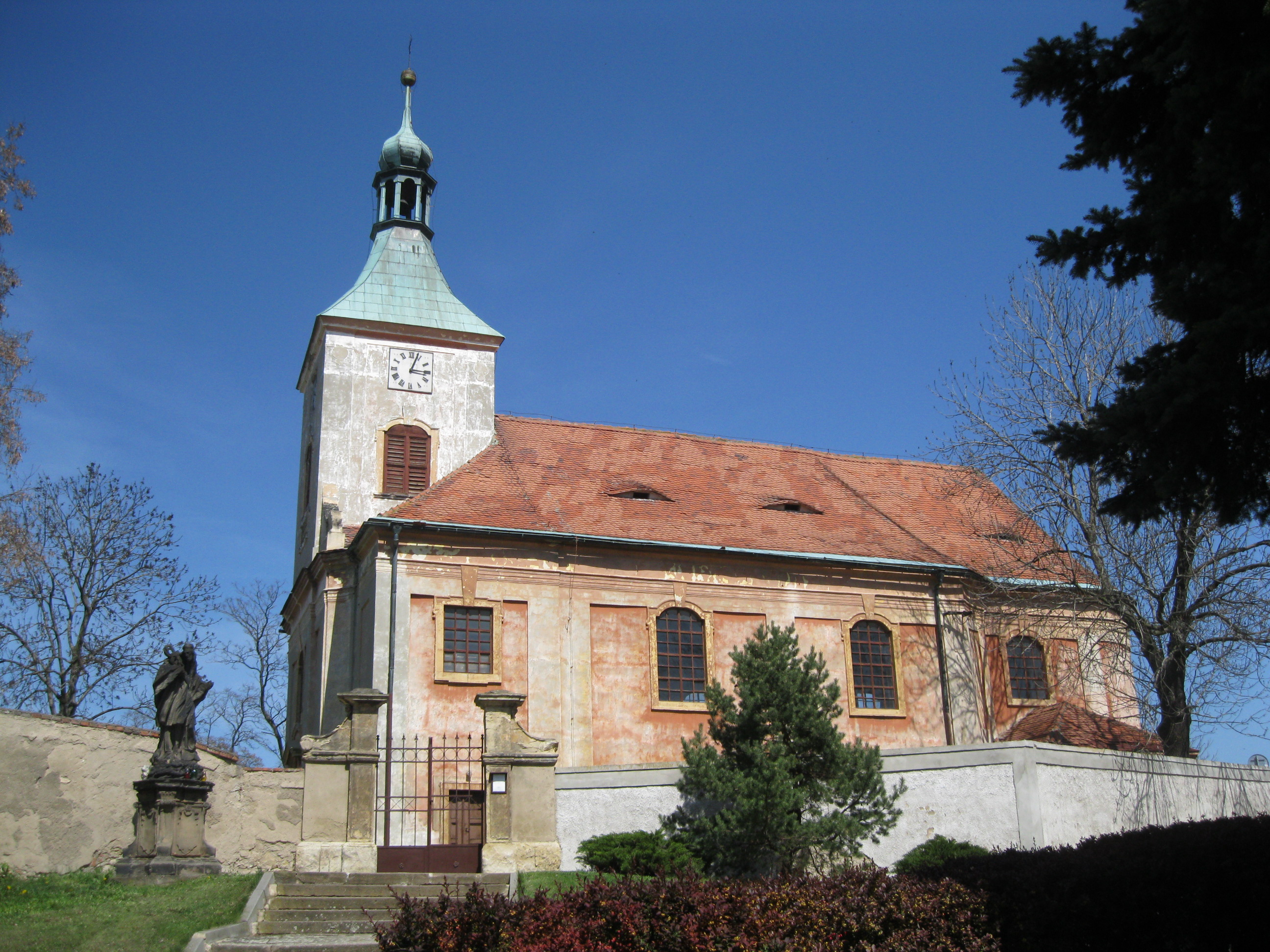 Bečov, okres Most. Kostel sv. Jiljí.